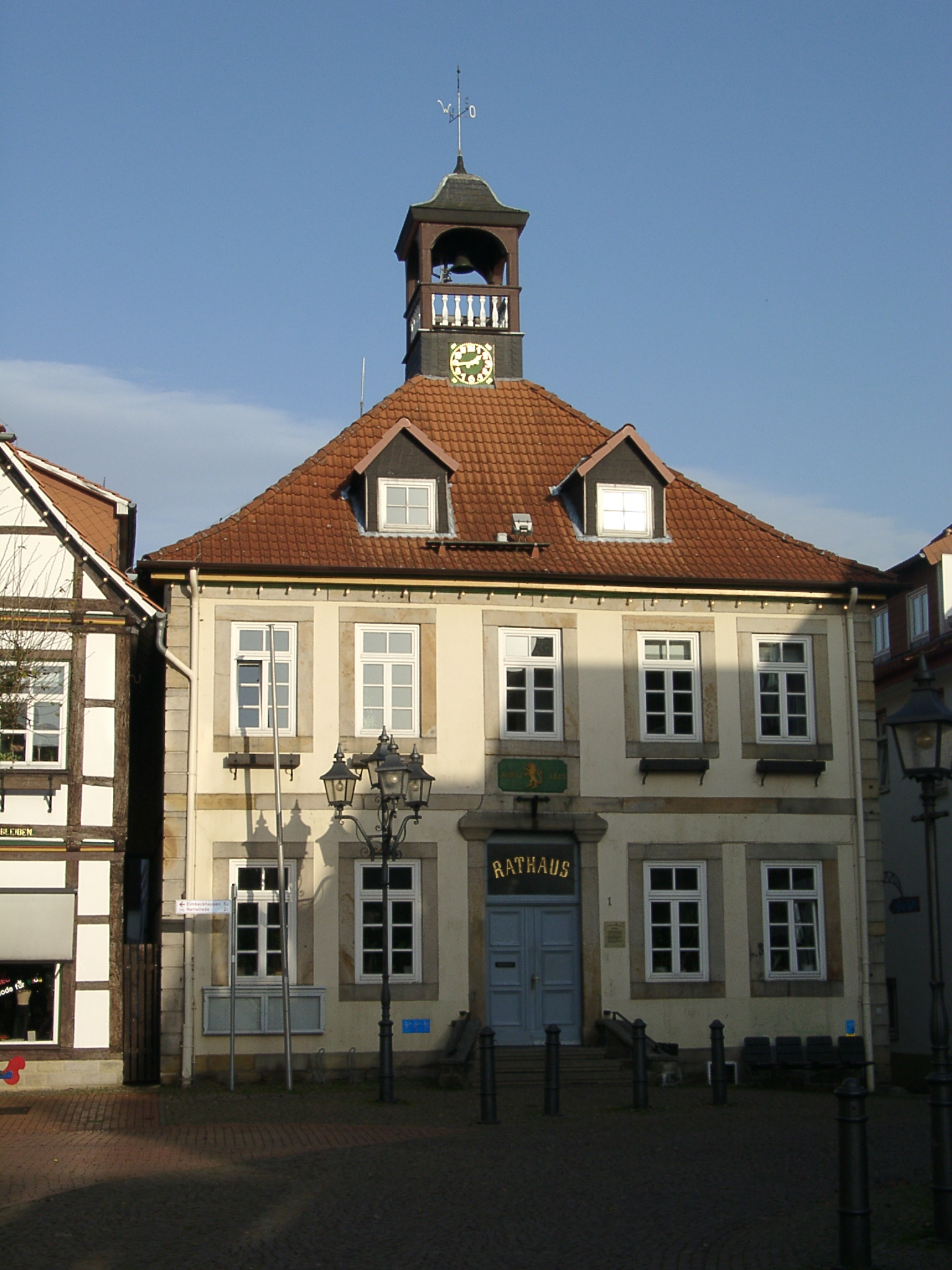 Altes Rathaus von Bad Münder